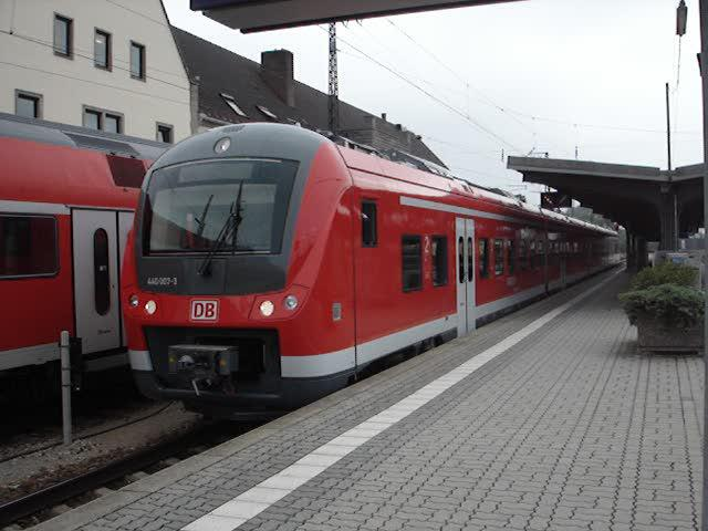 440 007 am 23. Juli 2008 in Bahnhof Donauwörth. Dieser Zug war auf Personalschulungsfahrt von Augsburg nach Treuchtlingen